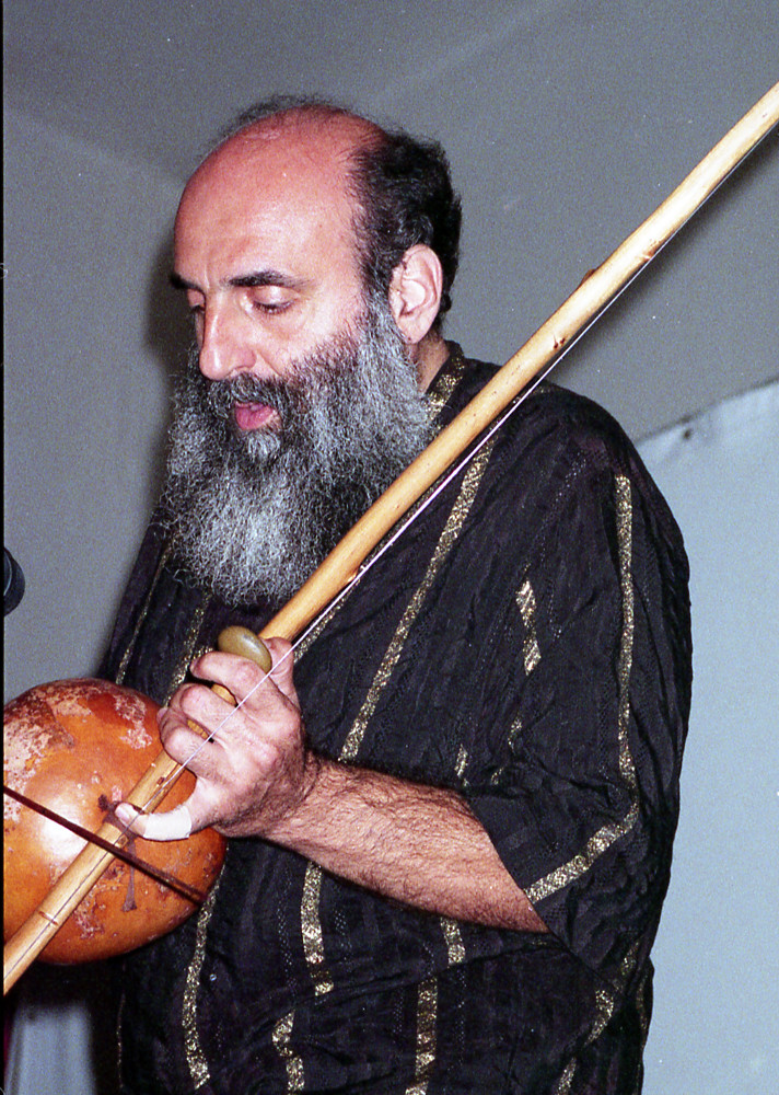 Peppe Consolmagno al Film Festival Visionaria nel 2000